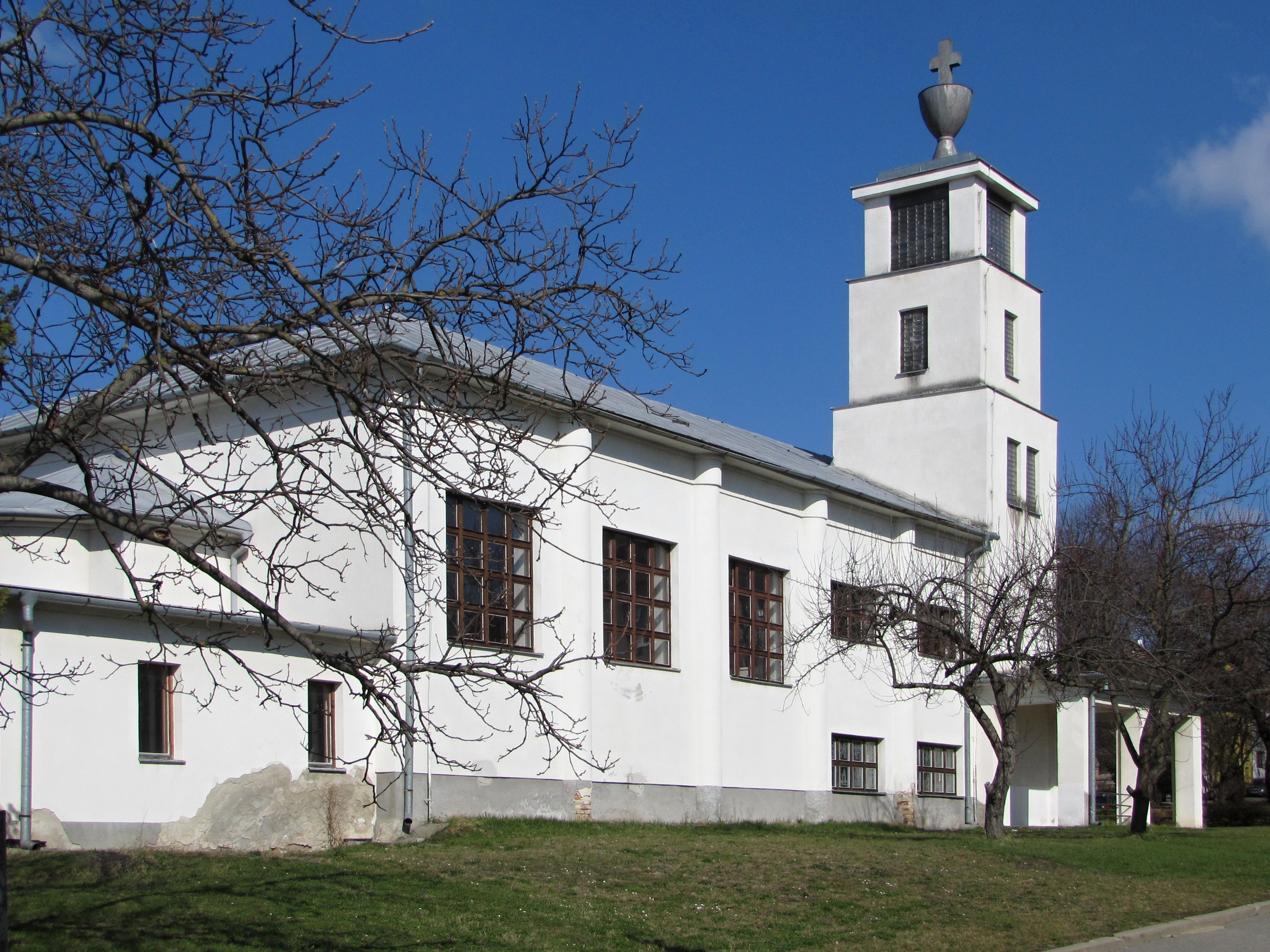 Kostel Církve československé husitské v Kyjově na Seifertově náměstí